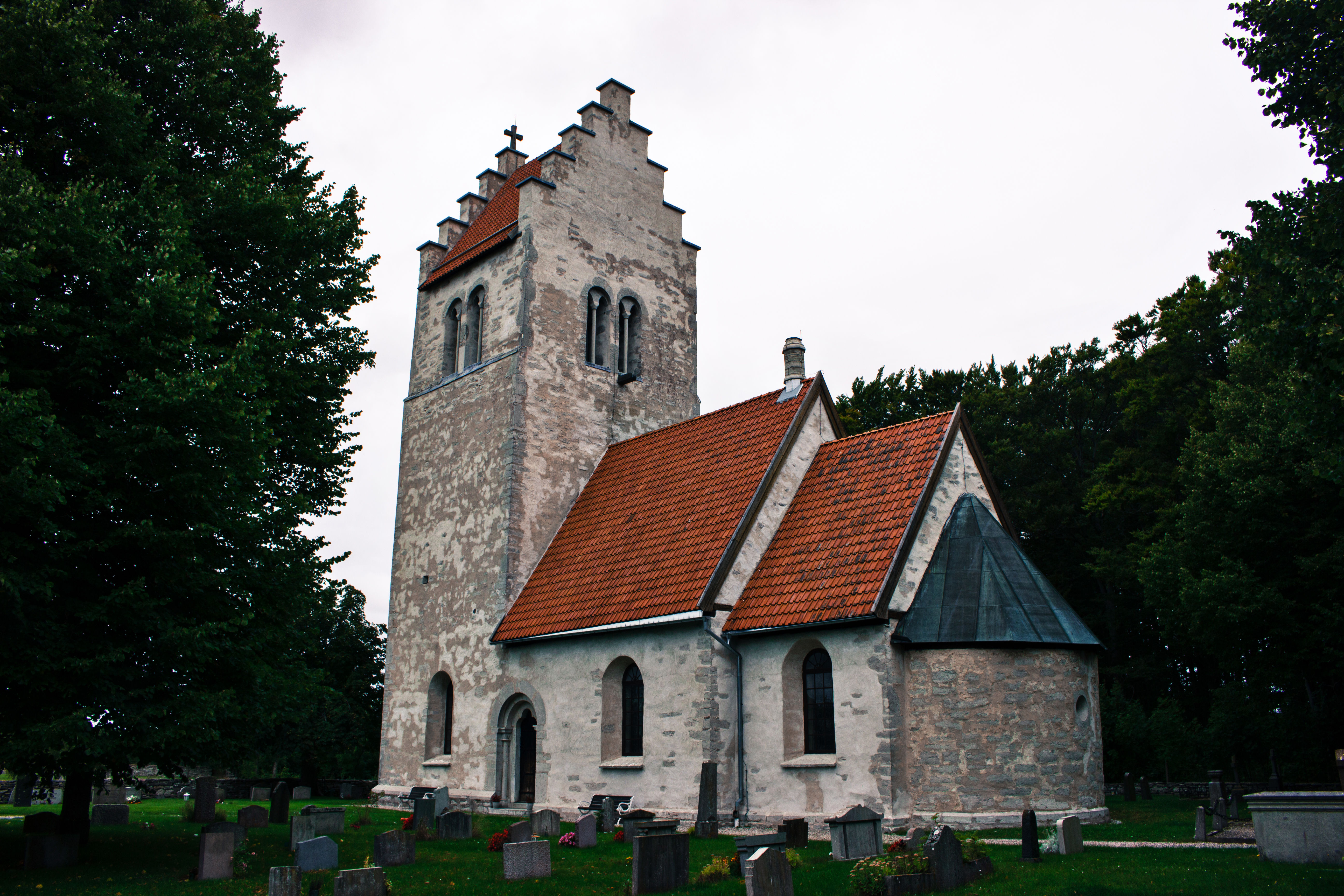 Igrexa de Västerhejde, na illa sueca de Gotland.